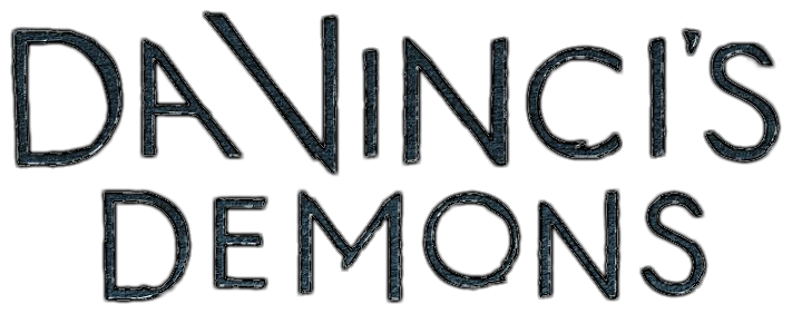 Da Vinci's Demons logo